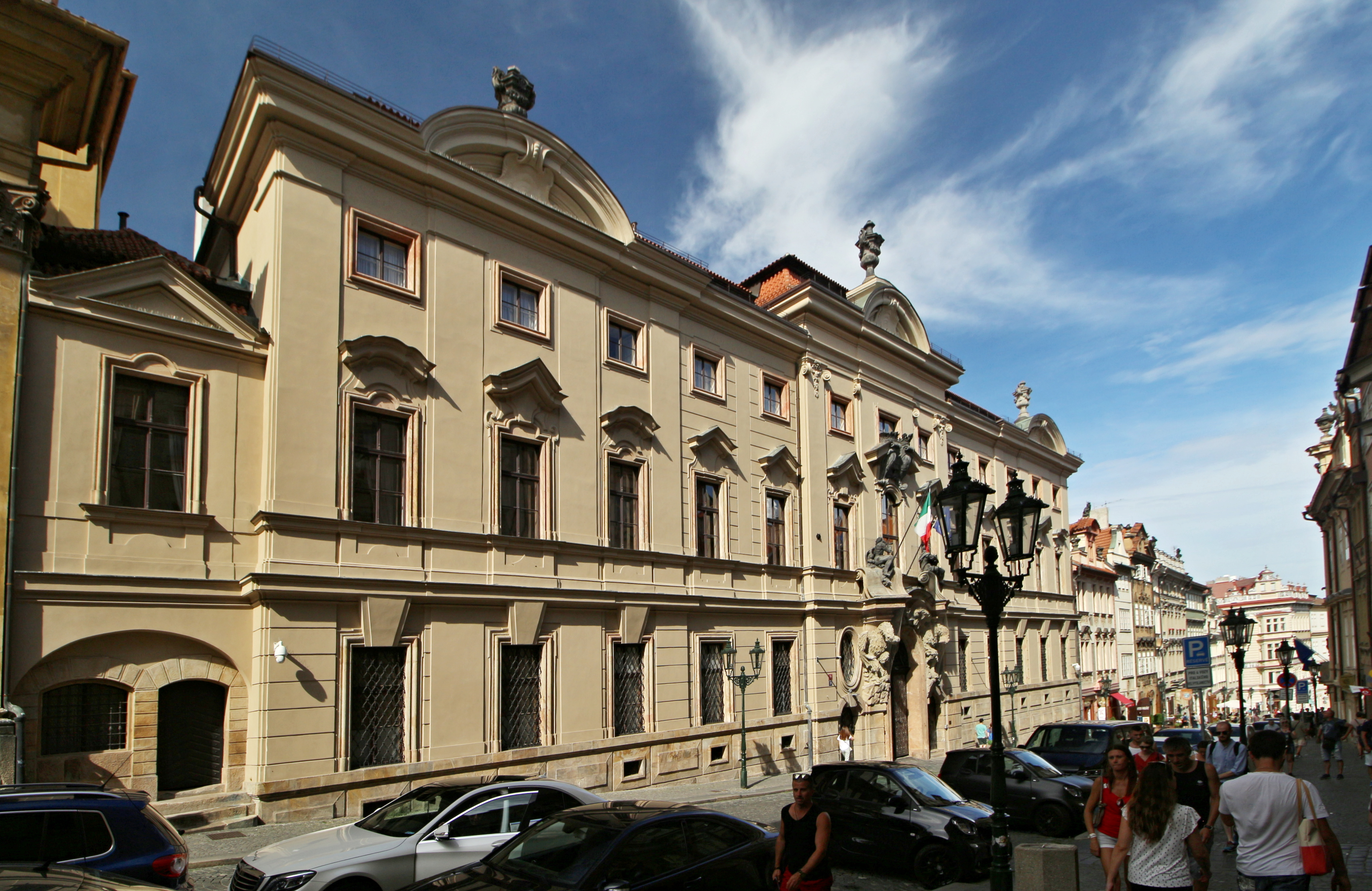 Praha 1-Malá Strana, Nerudova ulice